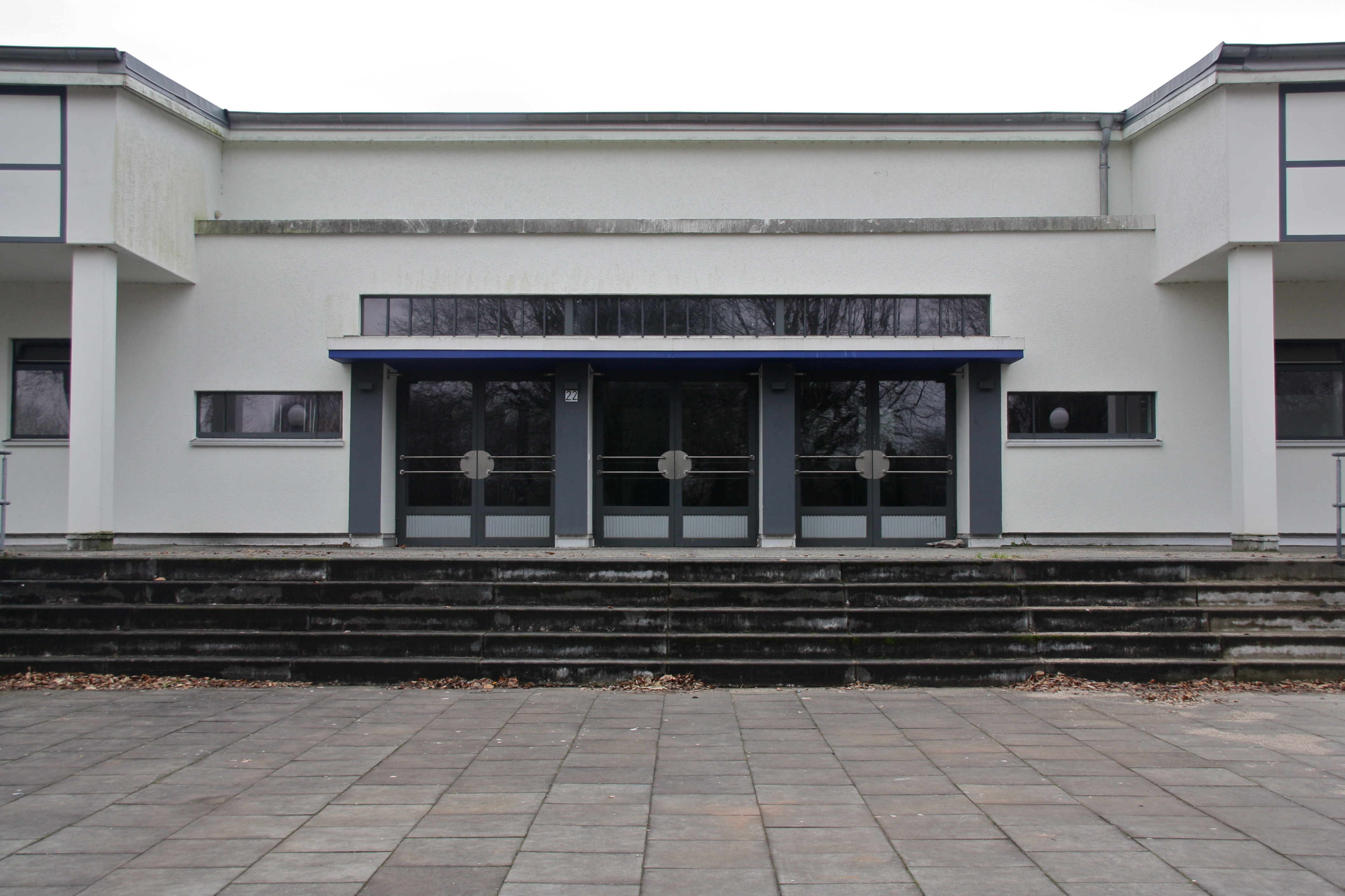 Hamburg, Niendorf, Künstlerhaus Sootbörn, Eingang